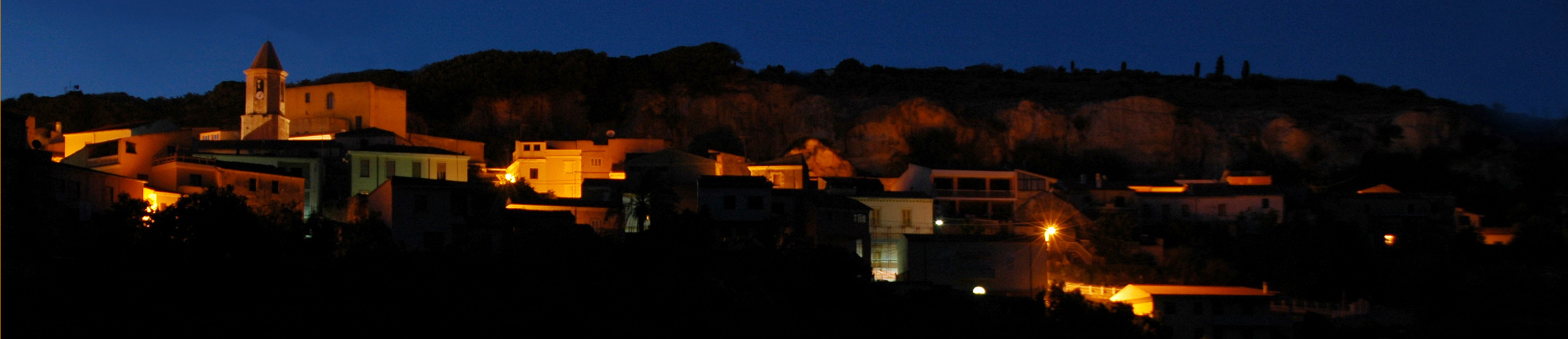 Sedini: centro storico_notturno